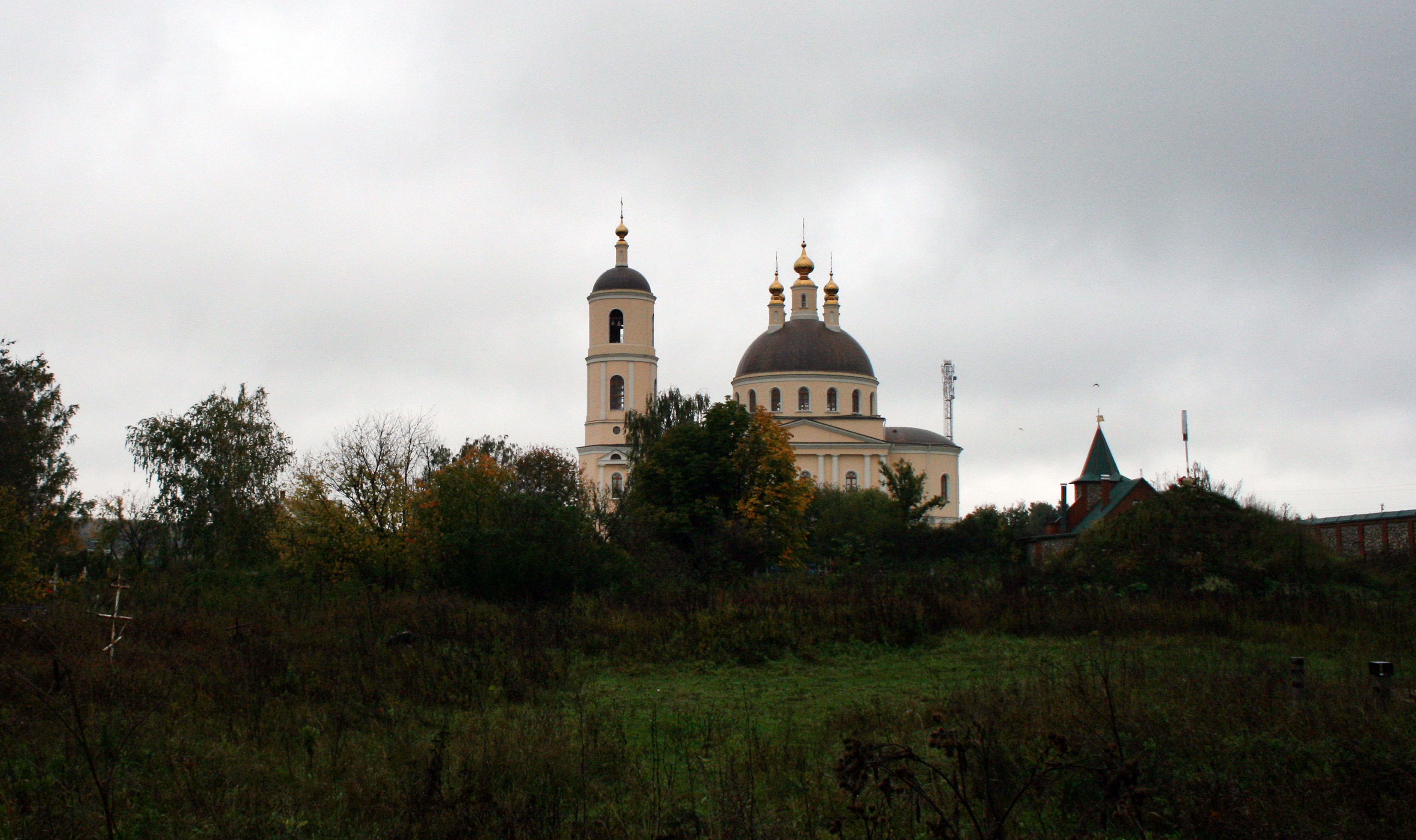 Свято-Покровский женский монастырь г. Михайлов. Рязанская митрополия РПЦ.